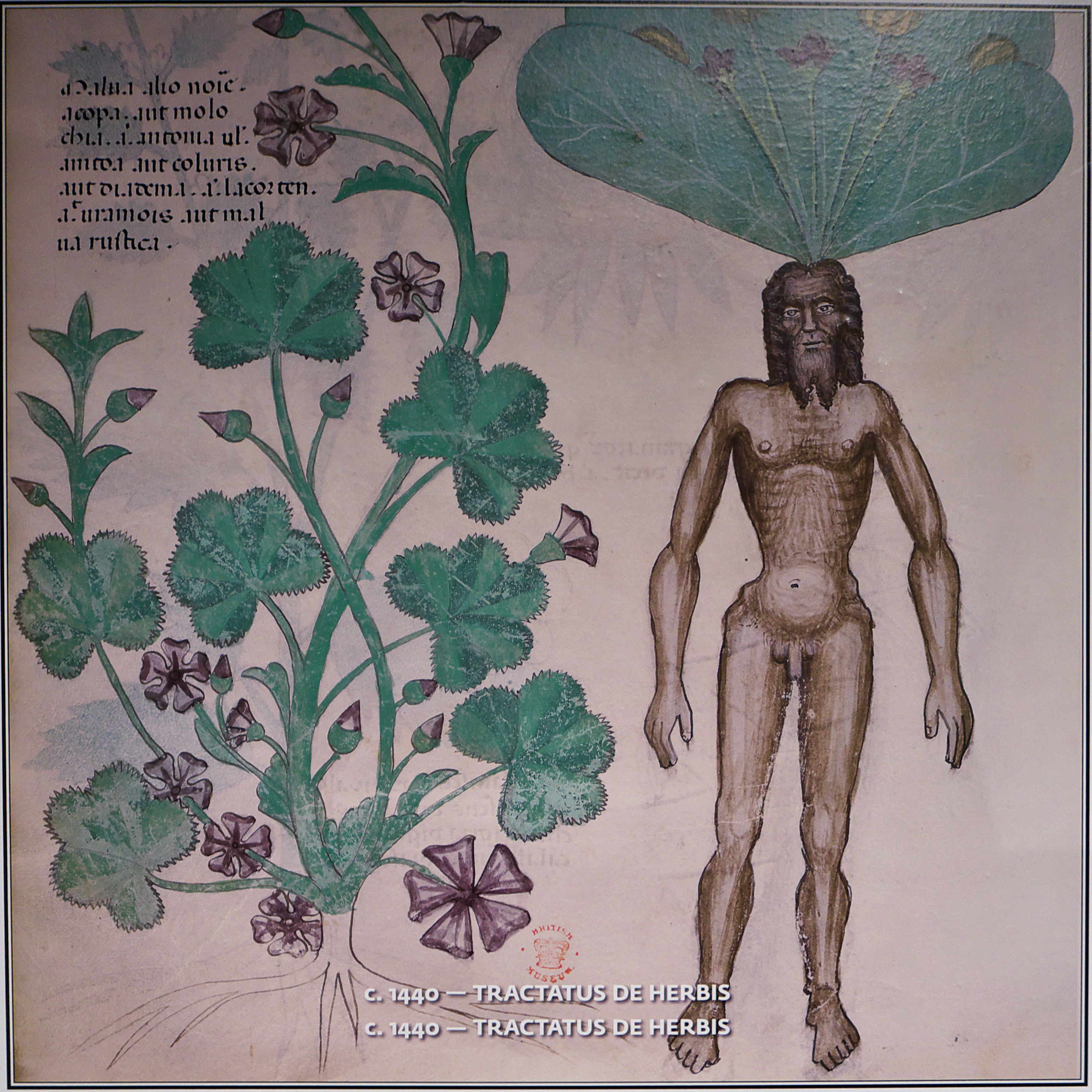 The British Library. Miniaturas de plantas (h. 1440), Sloane 4016. Una planta de mandrágora con un hombre desnudo como raiz.